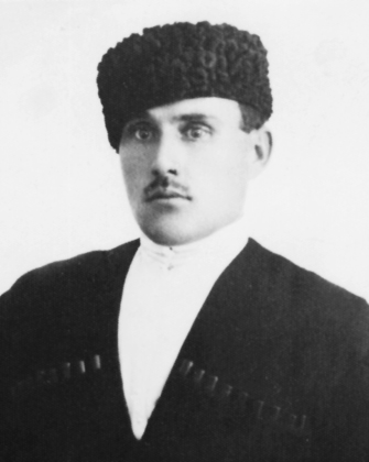 Նիկոլ (Կուռո) Թարխանյան (1896-1944), հայ ազատագրական շարժման գործիչ